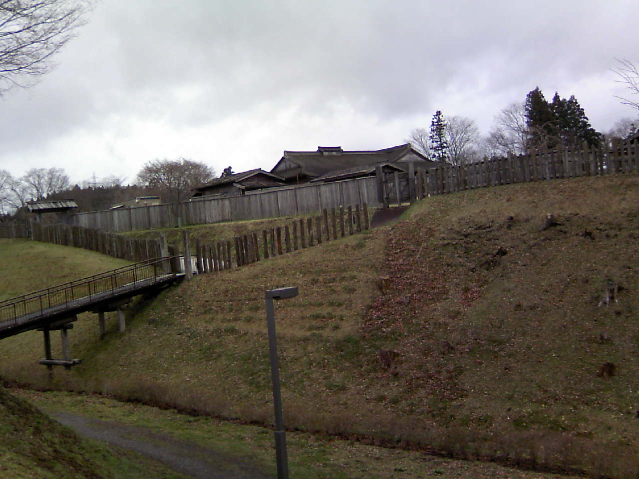 根城「中館から本丸を望む」（史跡根城の広場） (NE-JO CASTLE / HONMARU - HACHINOHE, AOMORI, JAPAN)